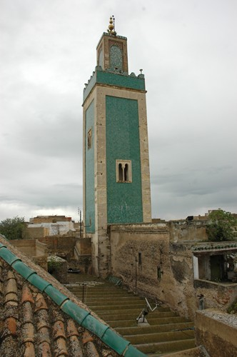 Meknès - Gran Mesquita